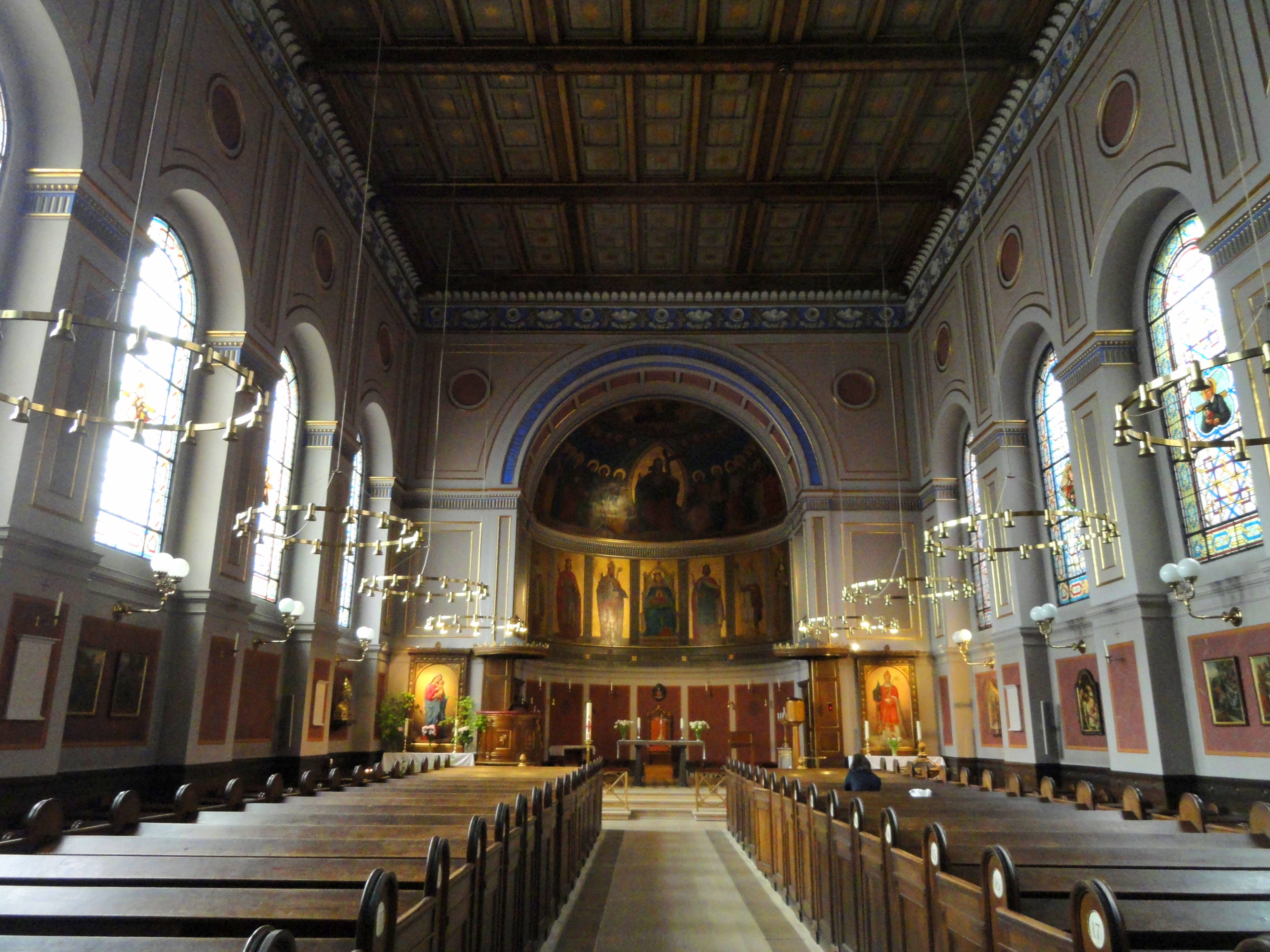 Sankt Ansgar Kirke, Copenhagen, Denmark.